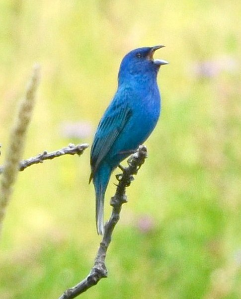 Indigo Bunting